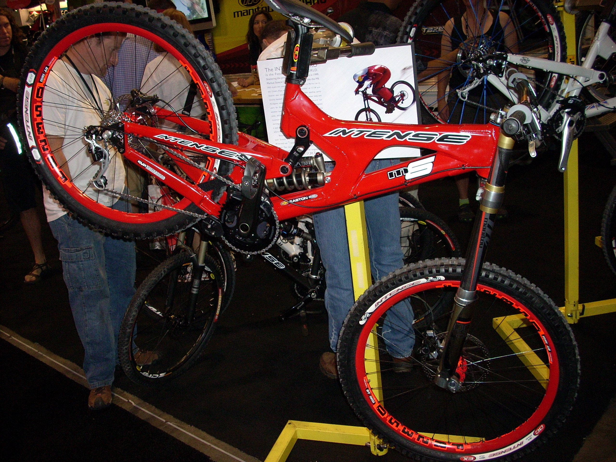 Intense M6